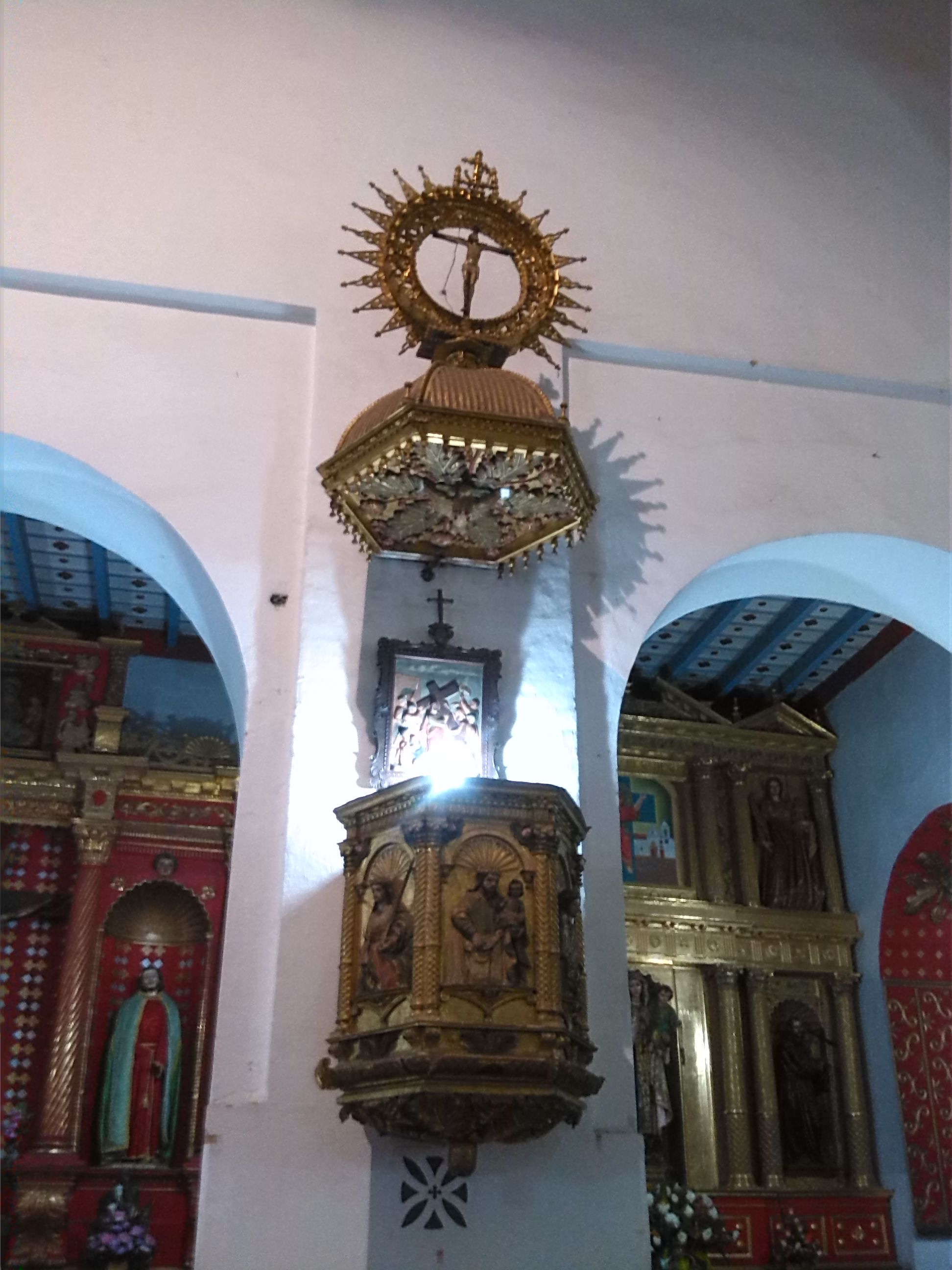 Púlpito en hojillado de oro en la Iglesia de San Francisco de Tunja de origen barroco colonial